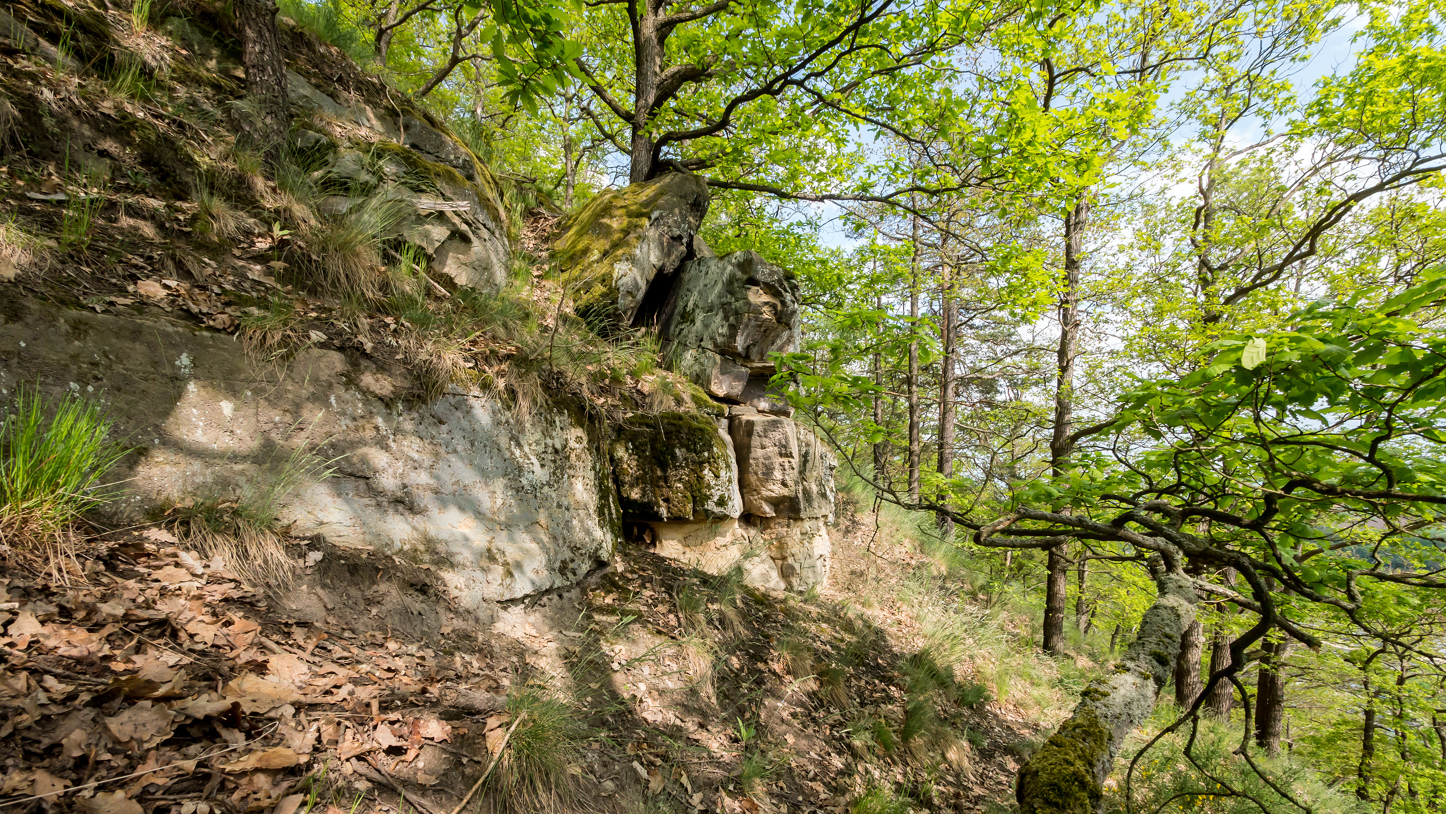 Hangmischwald, Felsformation mit Pionierrasen im Naturschutzgebiet „Schenkenberg“, Thüringen; III